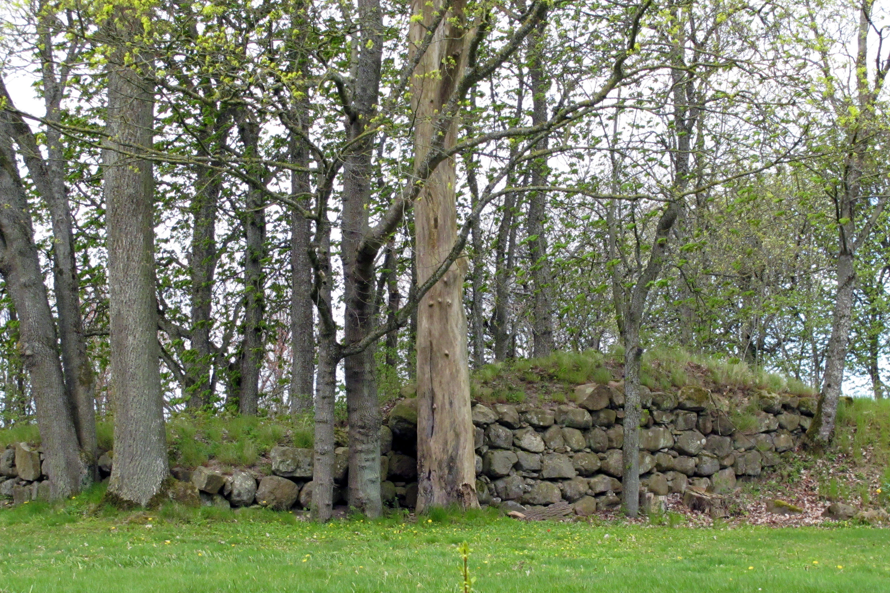 Rest av borganläggning i Stora Brandsvig i Tostarp, Ängelholms kommun.